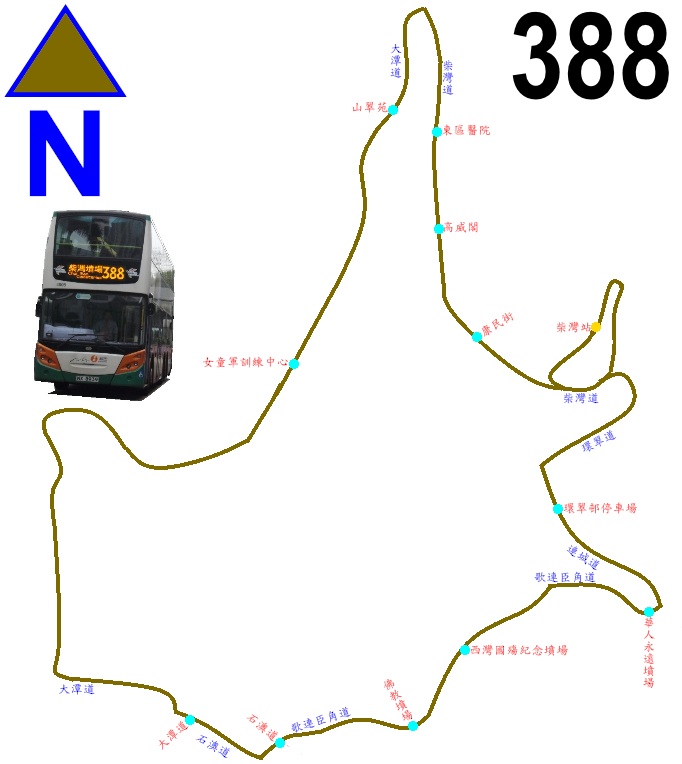 中文（香港）: 新巴388線的走線圖